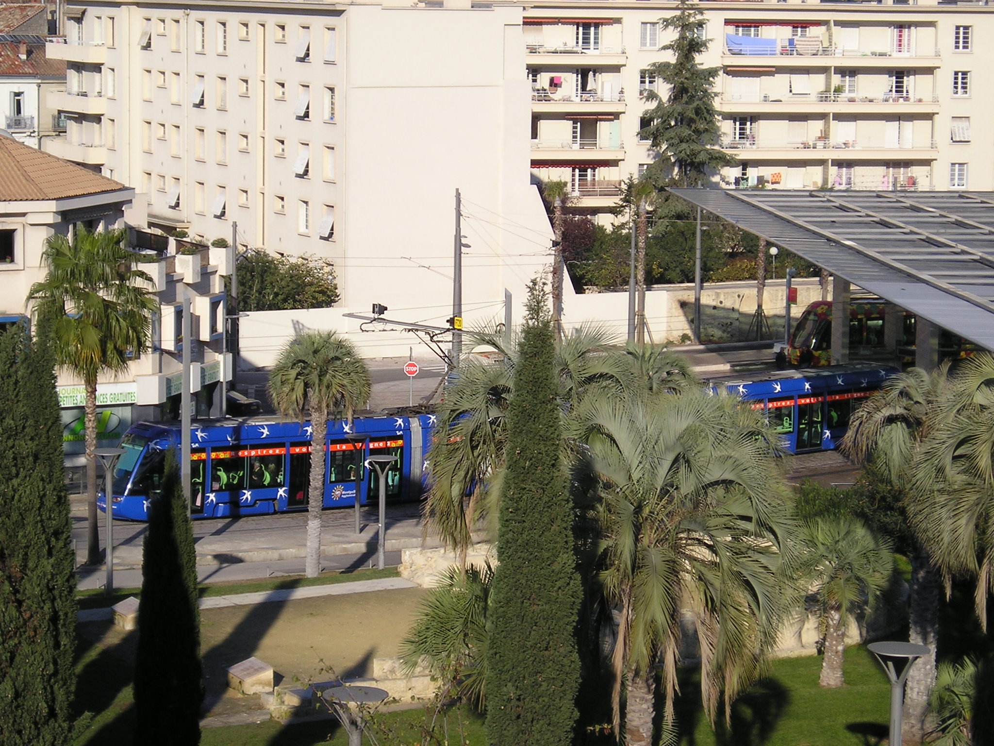 Une rame de la ligne 1 (bleu, premier plan) et une de la ligne 2 (orange au fond) à l'arrêt à la station Corum, dans Montpellier.